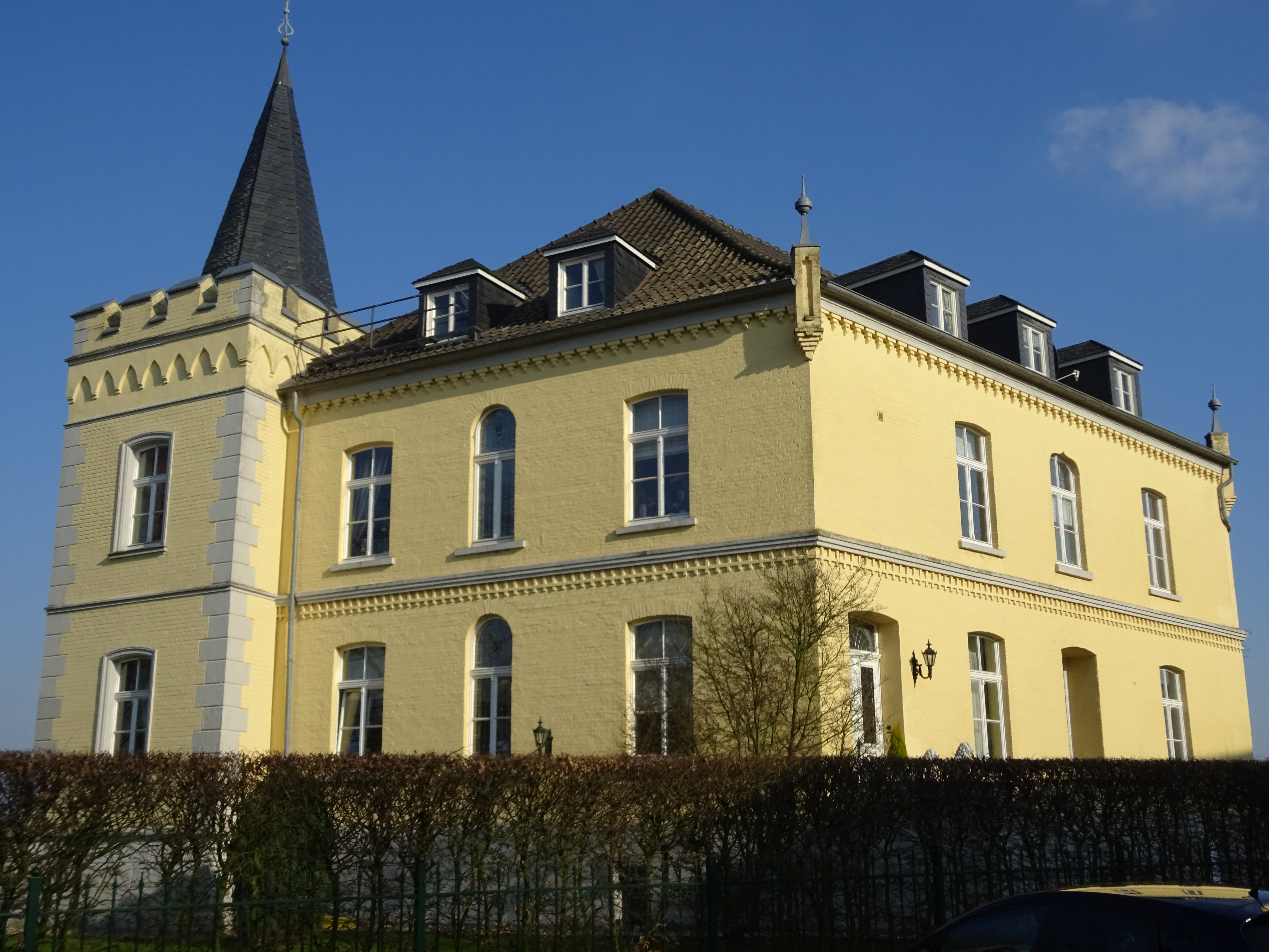 Kalkar-Gieth, Schlosshotel Haus Grieth, Schlossstraße 19